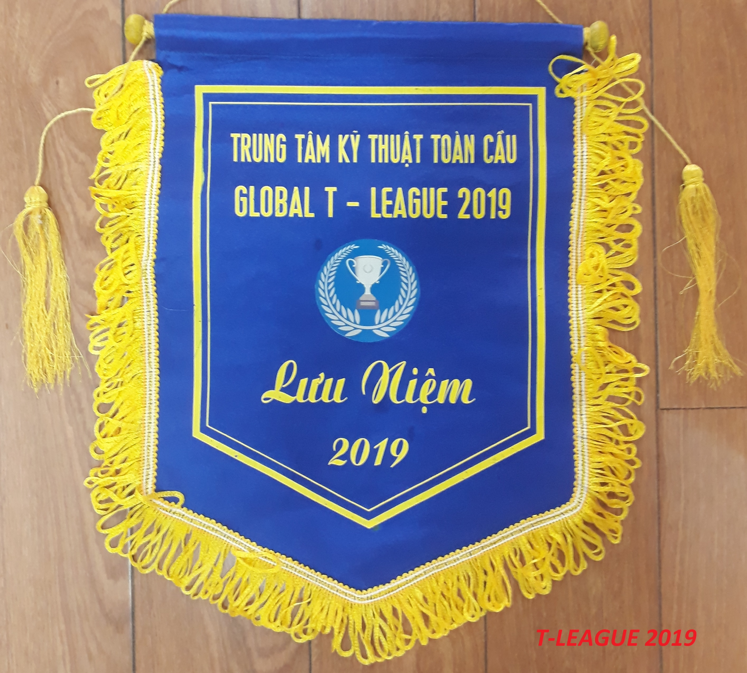 Tleague2019Flag